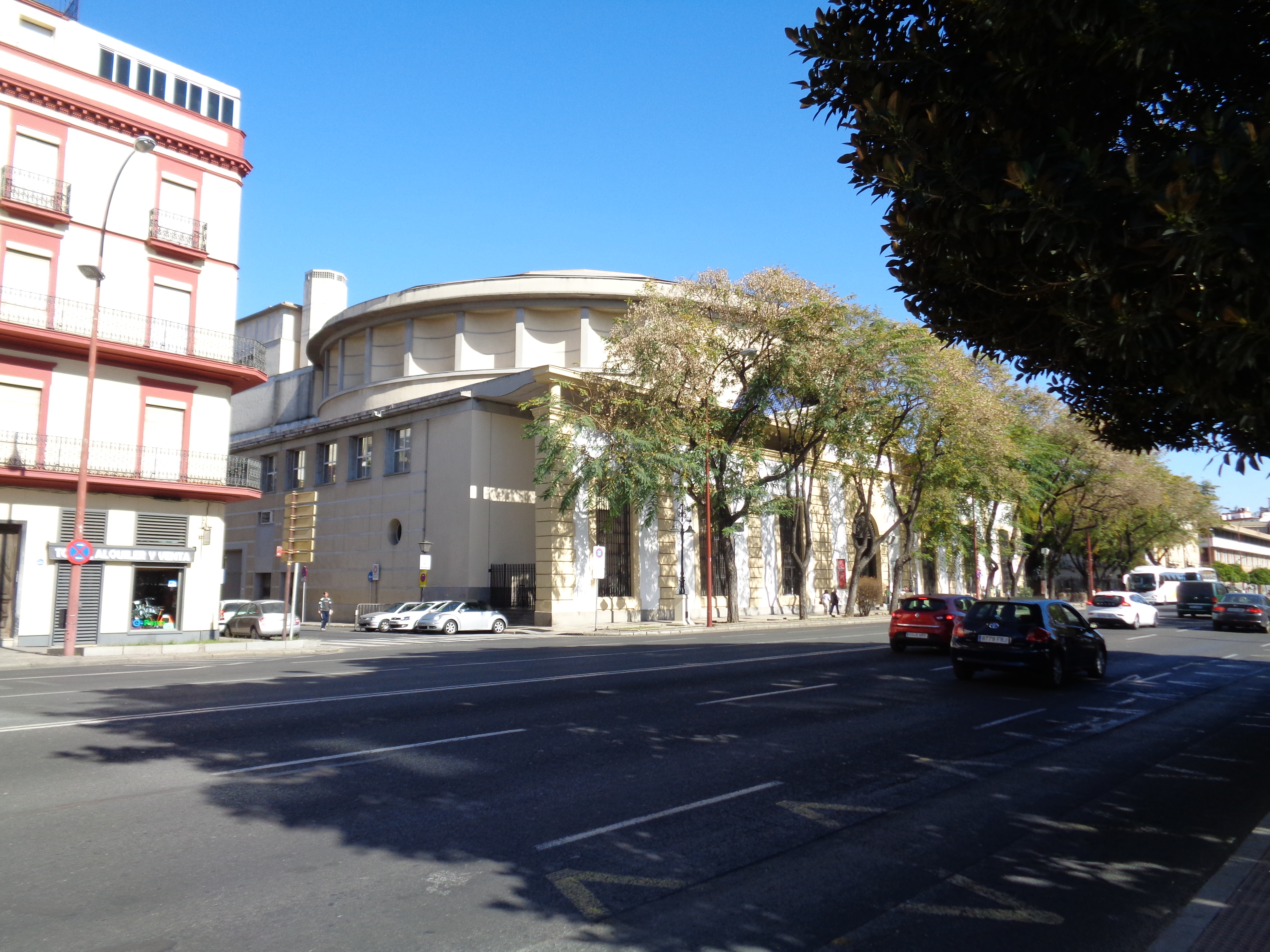 Teatro de la Maestranza, en la ciudad de Sevilla